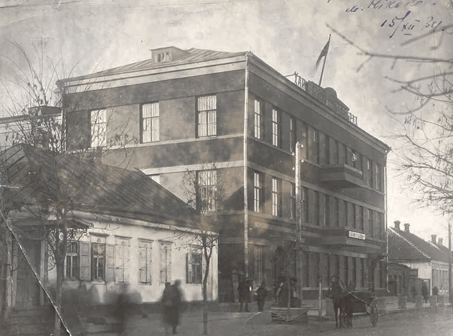 Здание горсовета г.Никополь в 1934 году